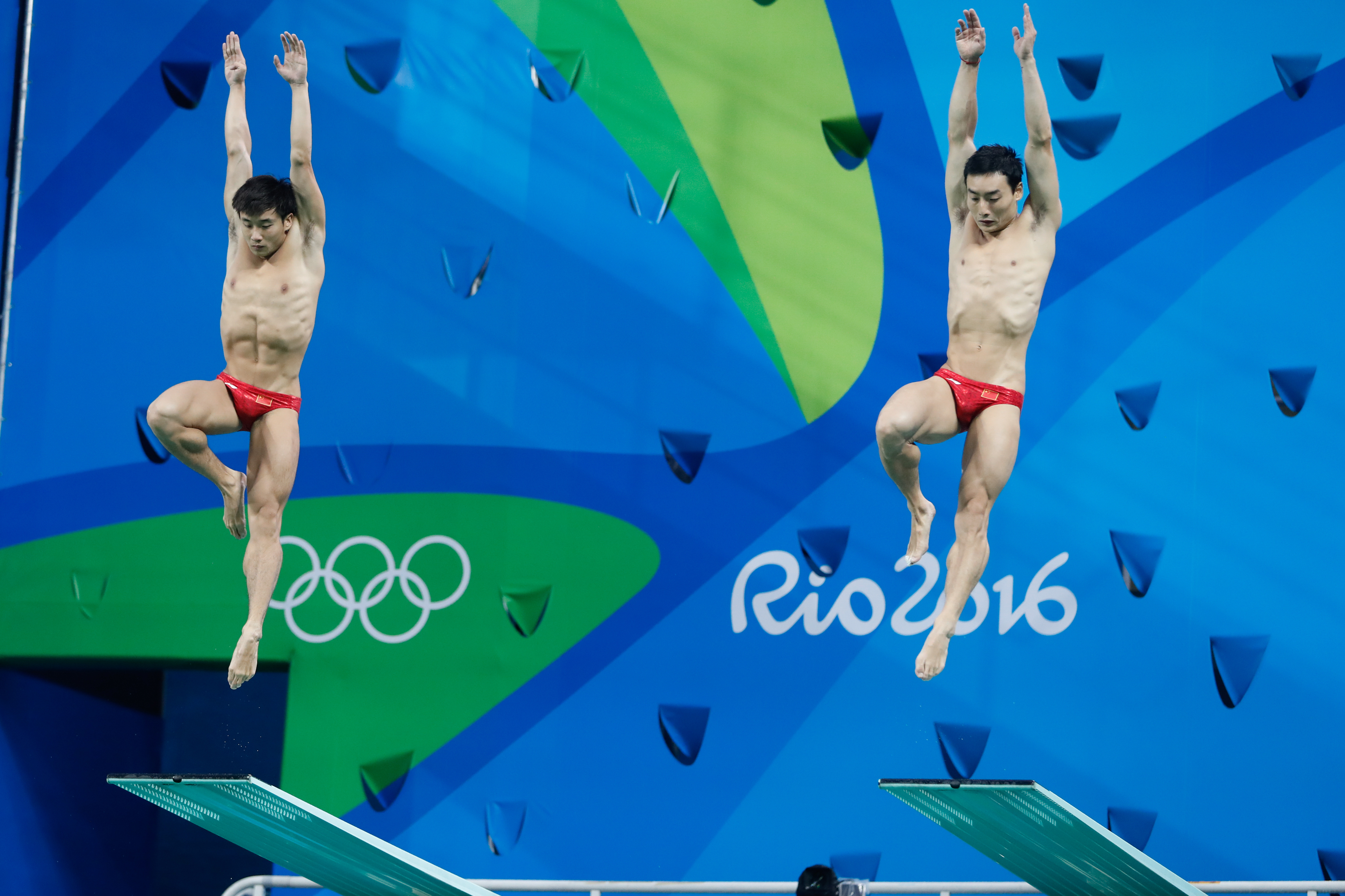 Rio de Janeiro - Chineses Yuan Cao e Kai Qin levam bronze no trampolim de 3 metros sincronizado dos saltos ornamentais nos Jogos Olímpicos Rio 2016, no Parque Aquático Maria Lenk (Fernando Frazão/Agência Brasil)